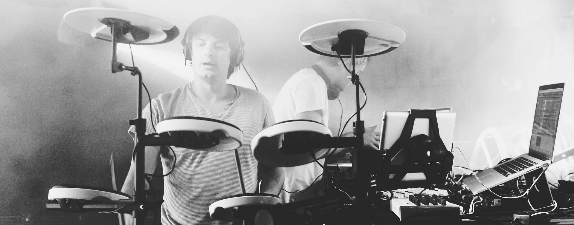 Camo&Krooked present Zeitgeist - Urban Art Forms Festival 2014